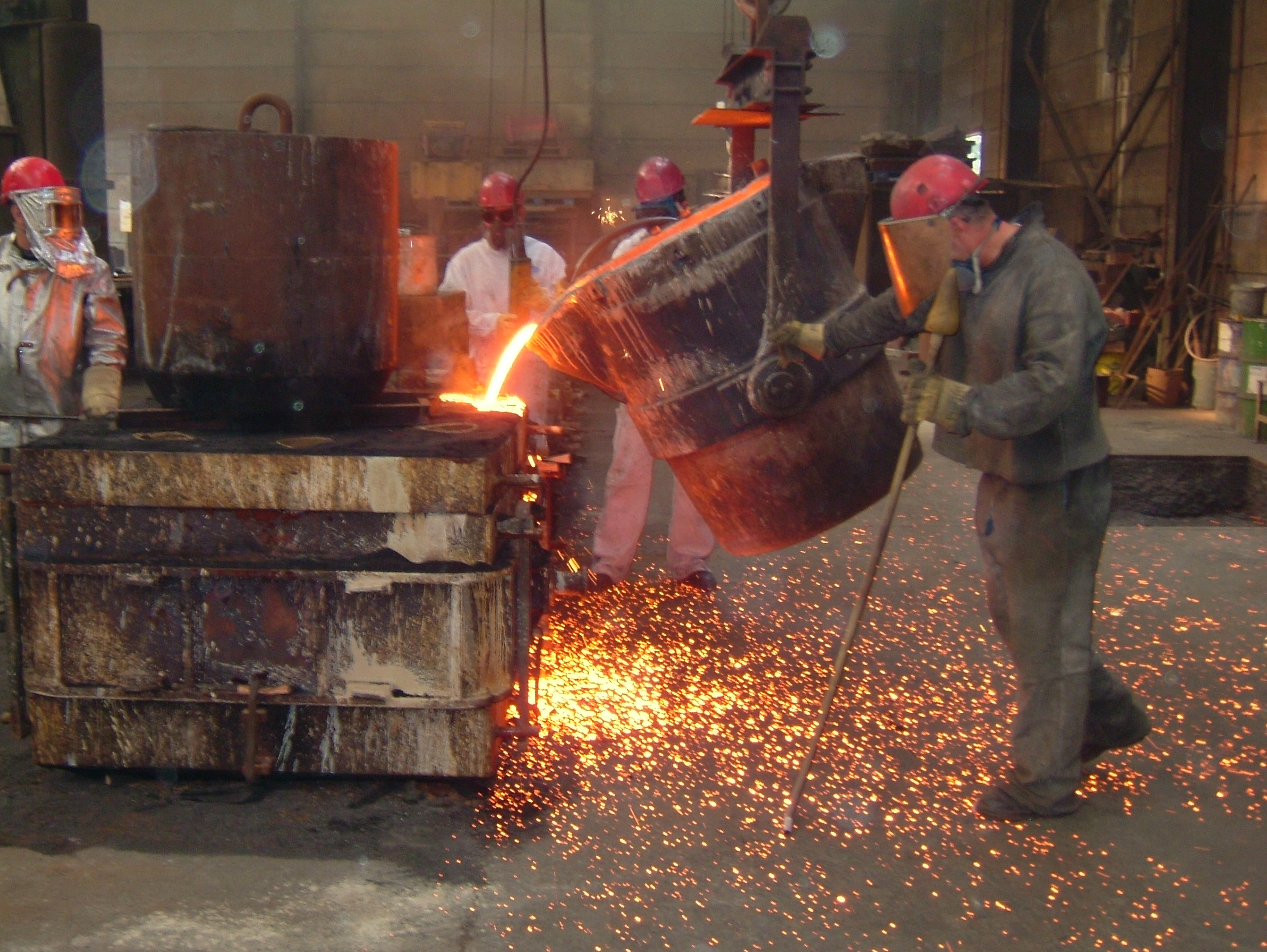 An der Géisserei Massard.